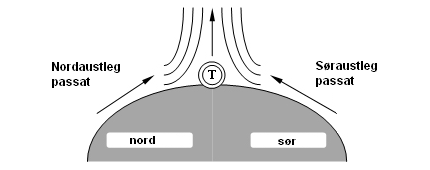 Skildring av ITC